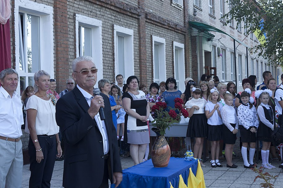 Василенко Станіслав Васильович